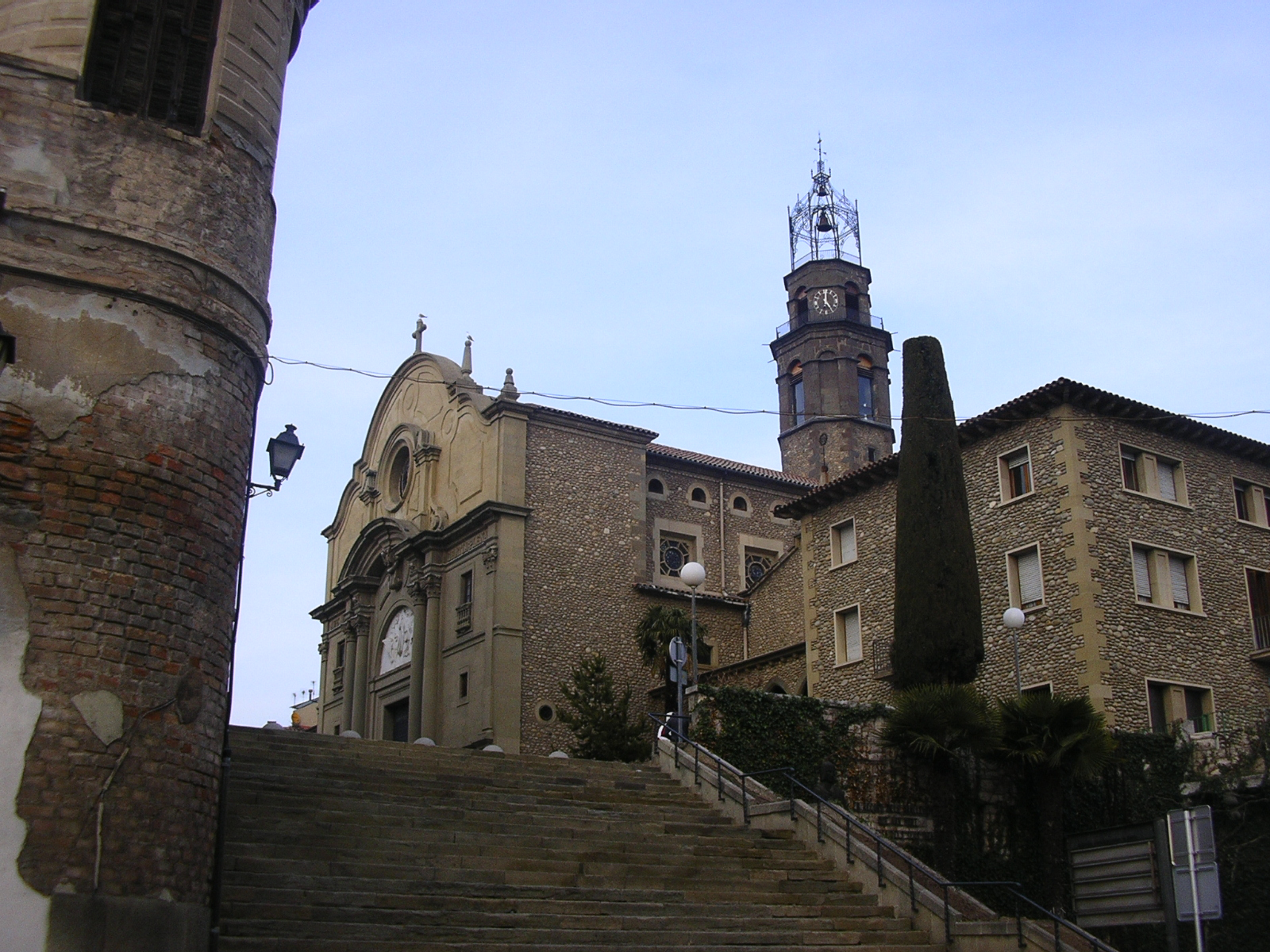 Manlleu, iglesia de Santa Maria